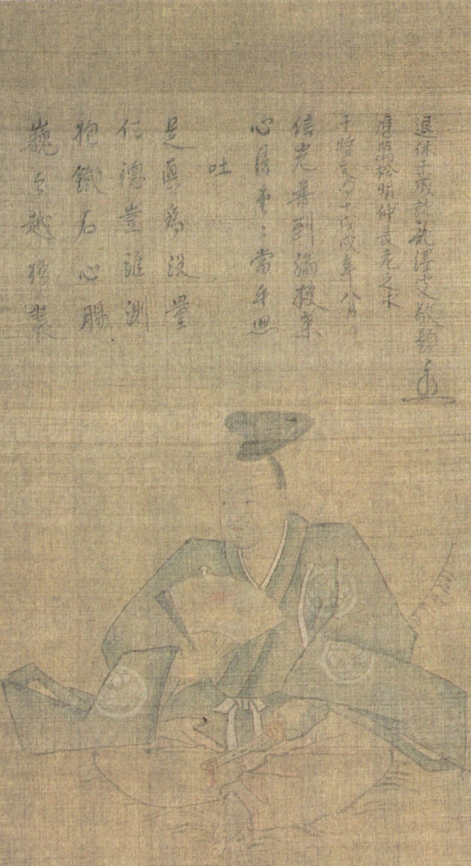 松平信光の肖像。